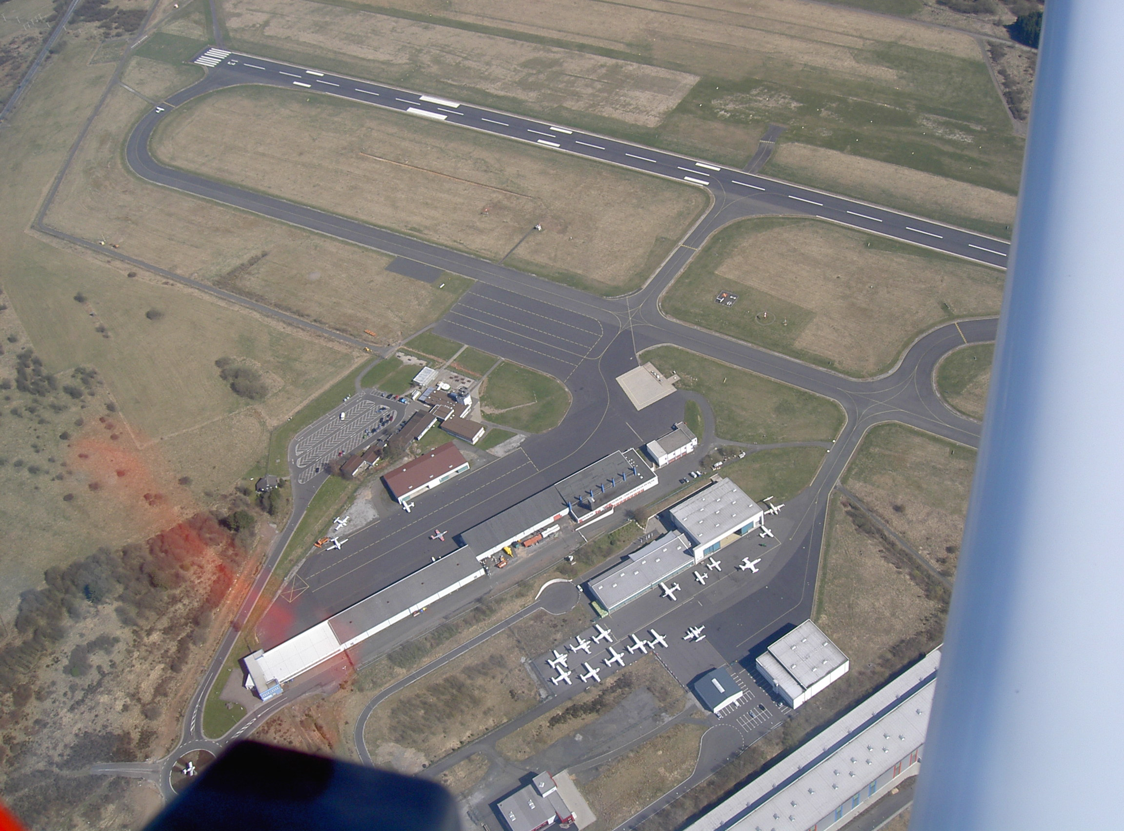 Siegerland Flughafen EDGS, Luftbildaufnahme vom Überflug